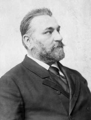 Szilágyi Dezső (1840–1901) jogtudós, egyetemi tanár, a Magyar Tudományos Akadémia levelező tagja, politikus, miniszter portréja. Ismeretlen szerző fényképfelvétele (1889)